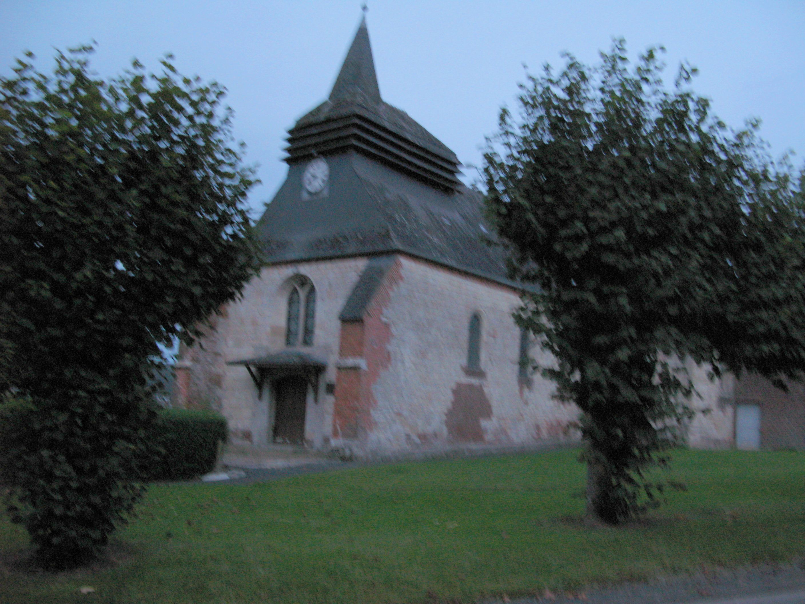 Montloué (Aisne, France) - L'église fortifiée. Photo floue (vu les conditions d'éclairage (chute du jour) et la non-utilisation d'un pied) qui sera à refaire ! Comme pour d'autres photos a priori ratées (ou inintéressantes) pour cause de lumière insuffisante (trop de flou ou de "grain"), je la dépose quand même sur Commons, dans l'attente de meilleures et parce qu'elles offrent une vision mystérieure et fantômatique de ces lieux chargés d'Histoire et de souvenirs oubliés des générations contemporaines.